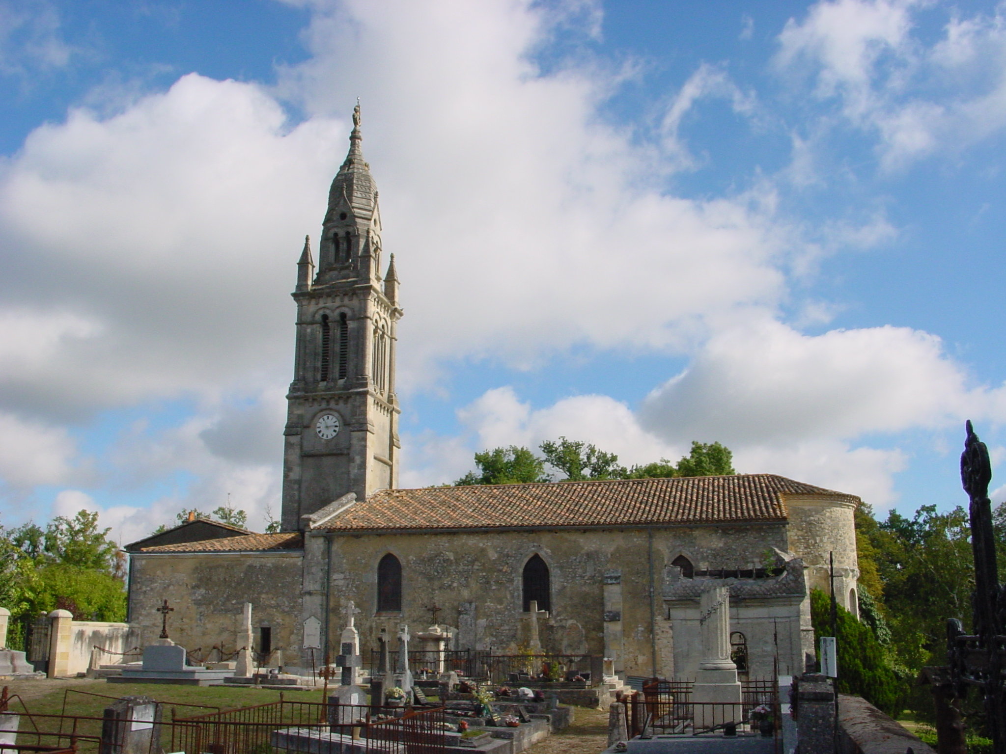 Photos prise par mes soins, je la laisse libre d'utilisation sans aucune restriction. Vous pouvez me contacter si vous voulez d'autres clichés de la ville. Catégorie:Image d'église de France